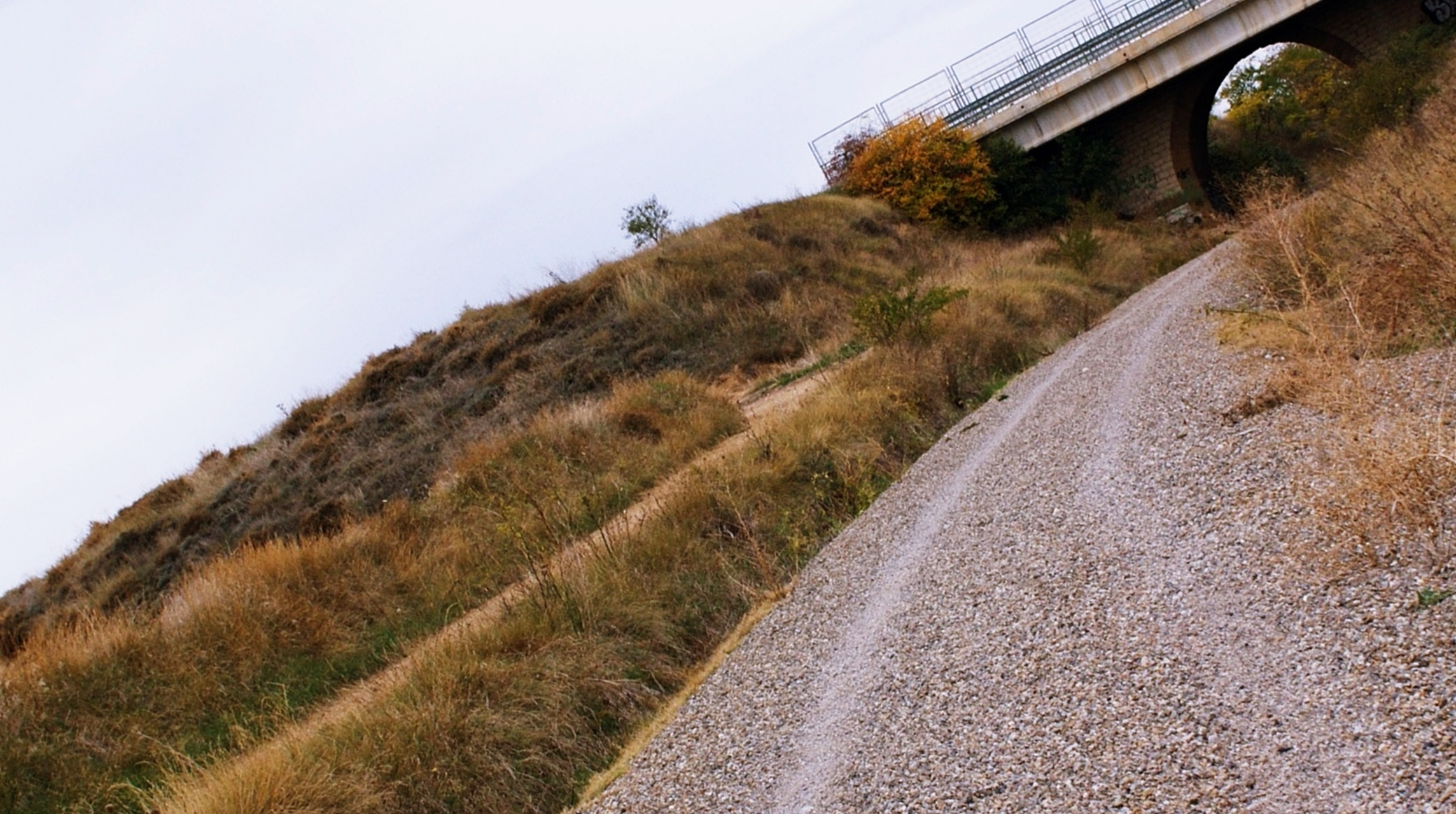 ejemplo de encuadre inclinado